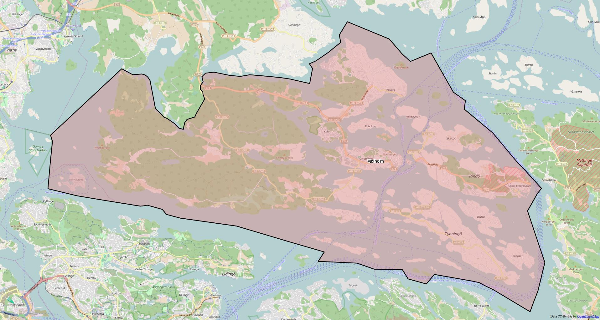 Distriktsindelningen i Vaxholms kommun World file 23.21510795006967243 0 0 -23.21510795006967243 2013508.16220300015993416 8280012.79934714362025261